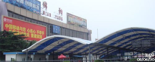 震后的绵阳火车站1